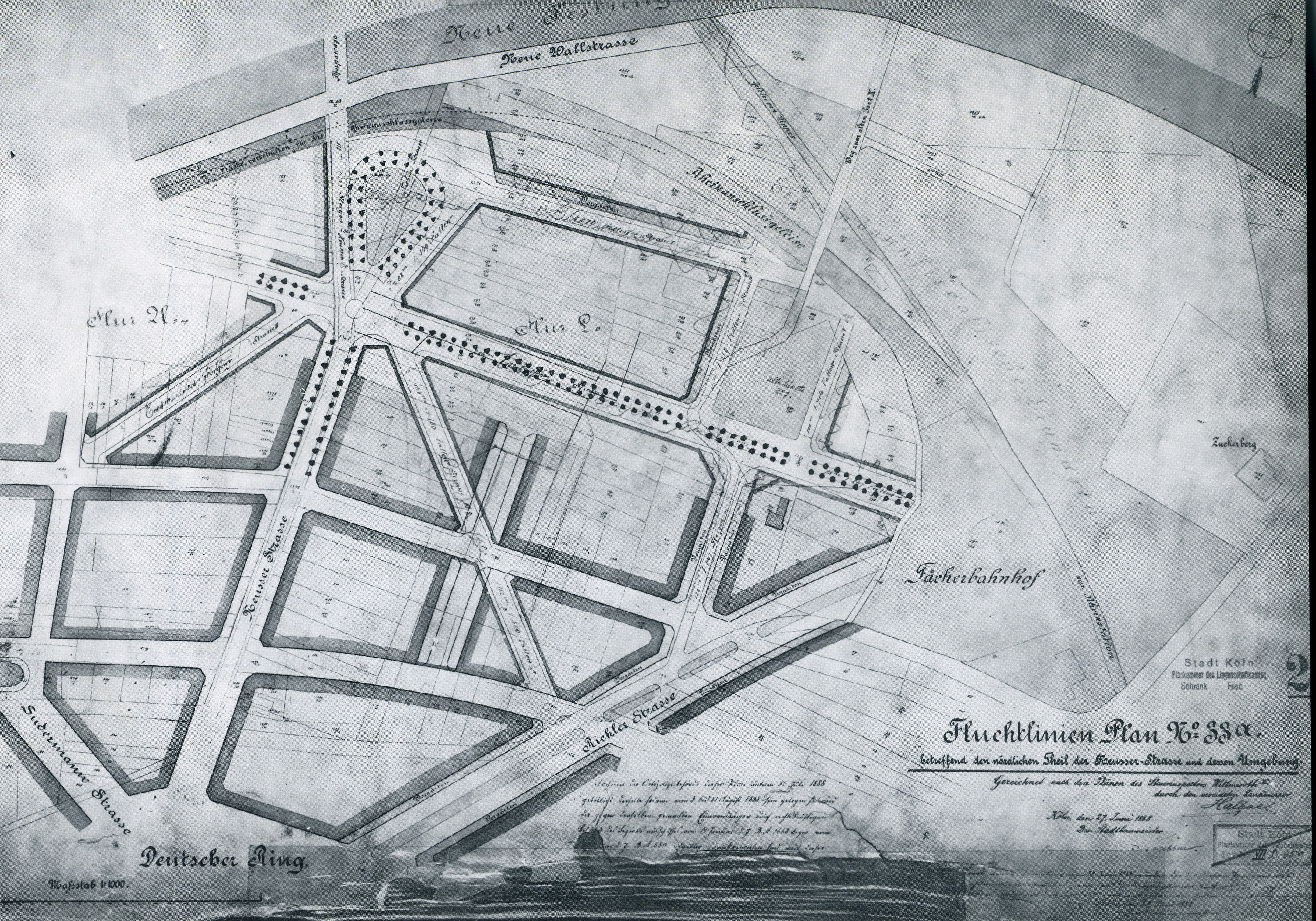 Karte zur Kölner Stadterweiterun von Stadtbaumeister J. Stübben im Jahr 1888. Detail des Fluchtlinienplanes 33a, Karte 25